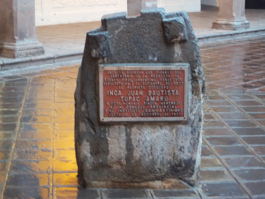 Monolito existente en la Municipalidad de Cuzco, conservando tierra del cementerio de la Recoleta de Buenos Aires, donde descansan los restos de Juan Bautista Túpac Amaru Inca.